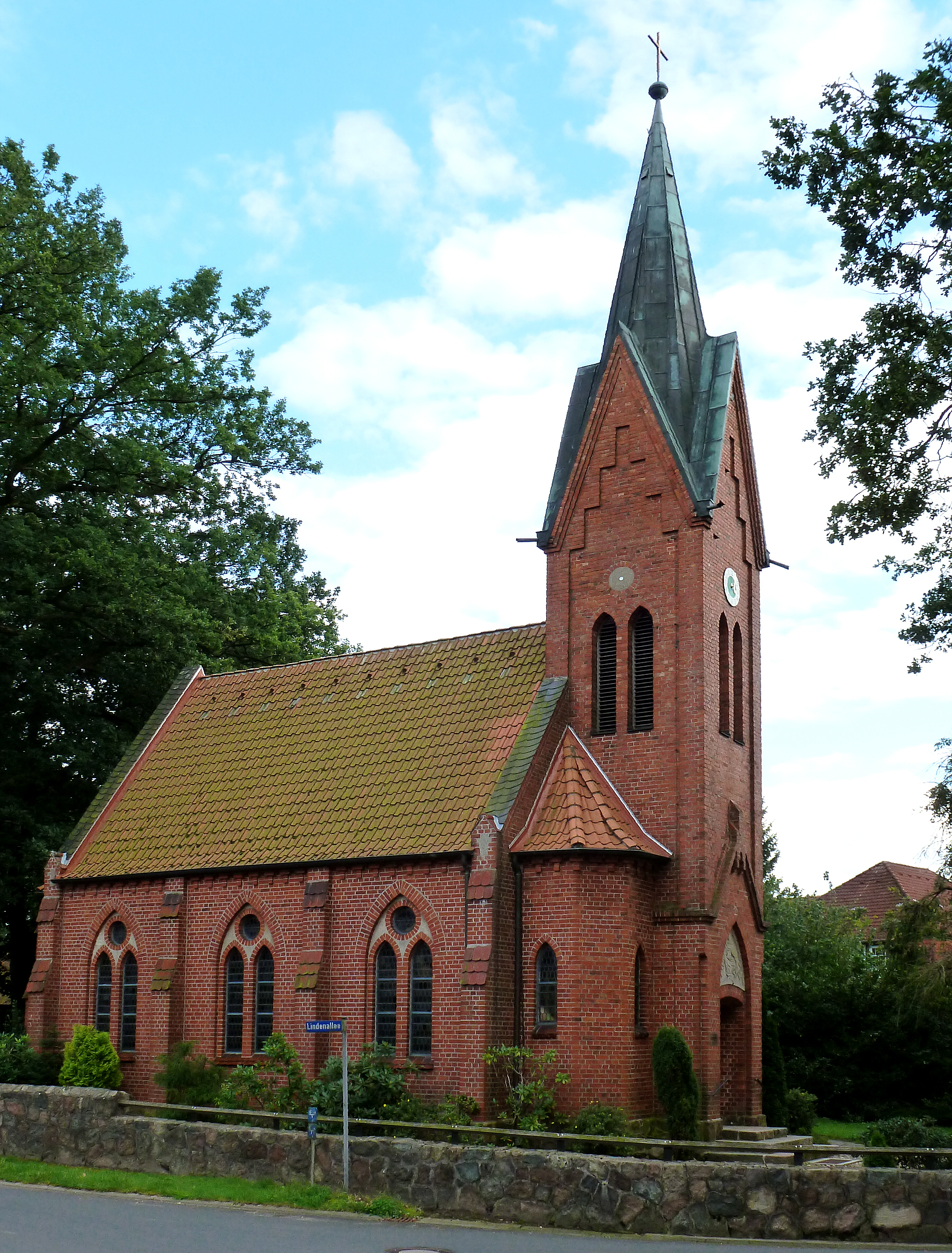 Evangelisch Lutherische St Pauli Kirche in Hörpel, einem Ortsteil von Bispingen. Erbaut im Stil der Backsteingotik in 1909.